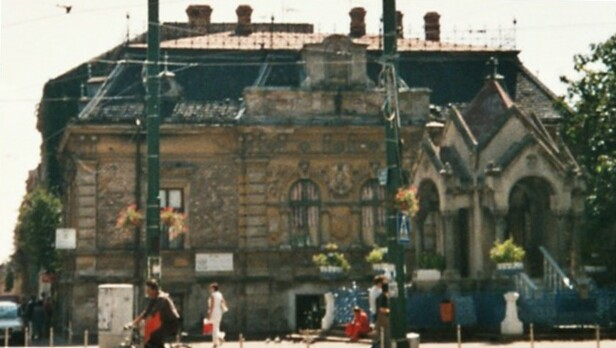 Vermutlich ältestes Gebäude in Timisoara FabGuy (Fotograf persönlich bekannt)